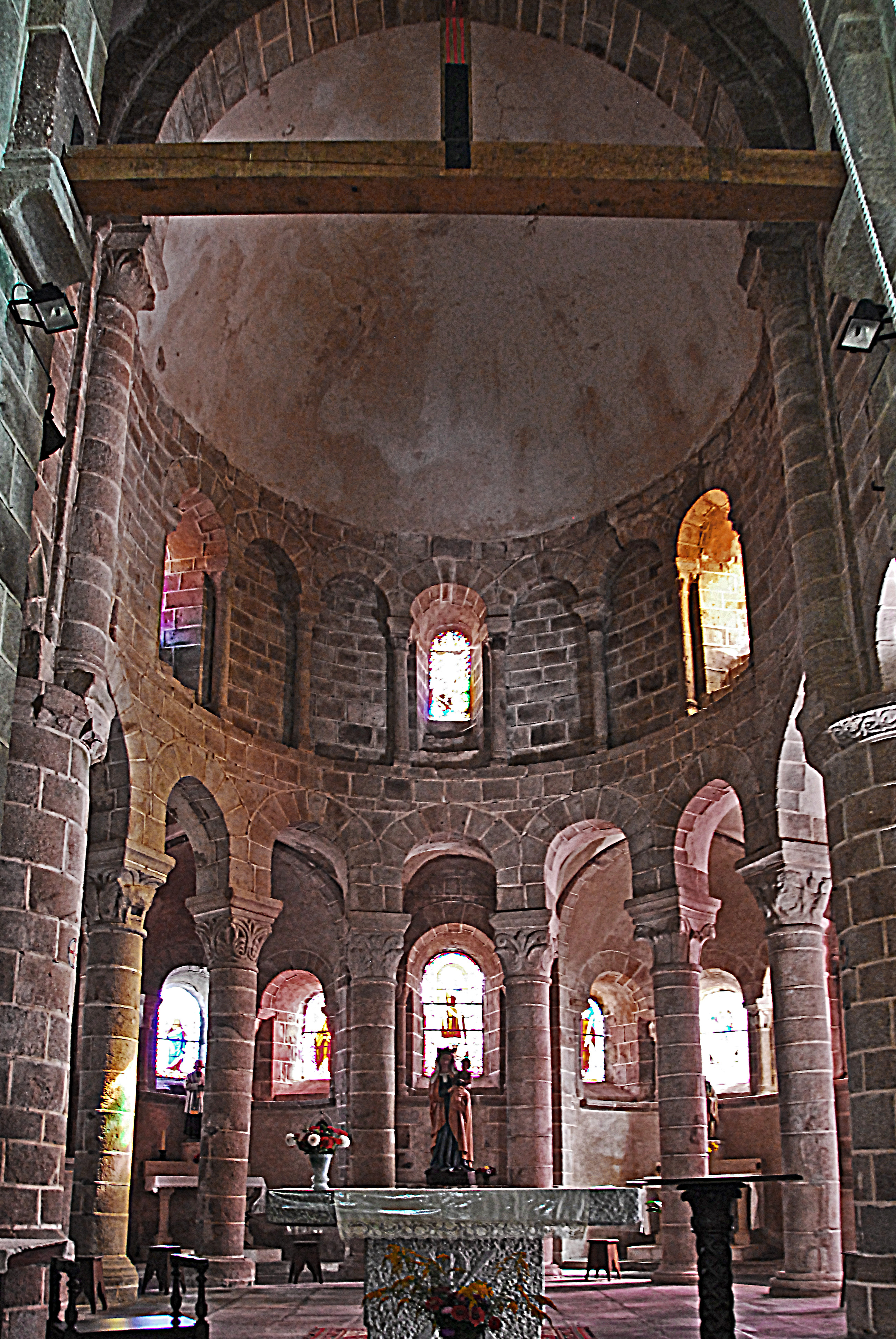 N.-D. de Châtel-Montagne, Chorapsis aus Vierung